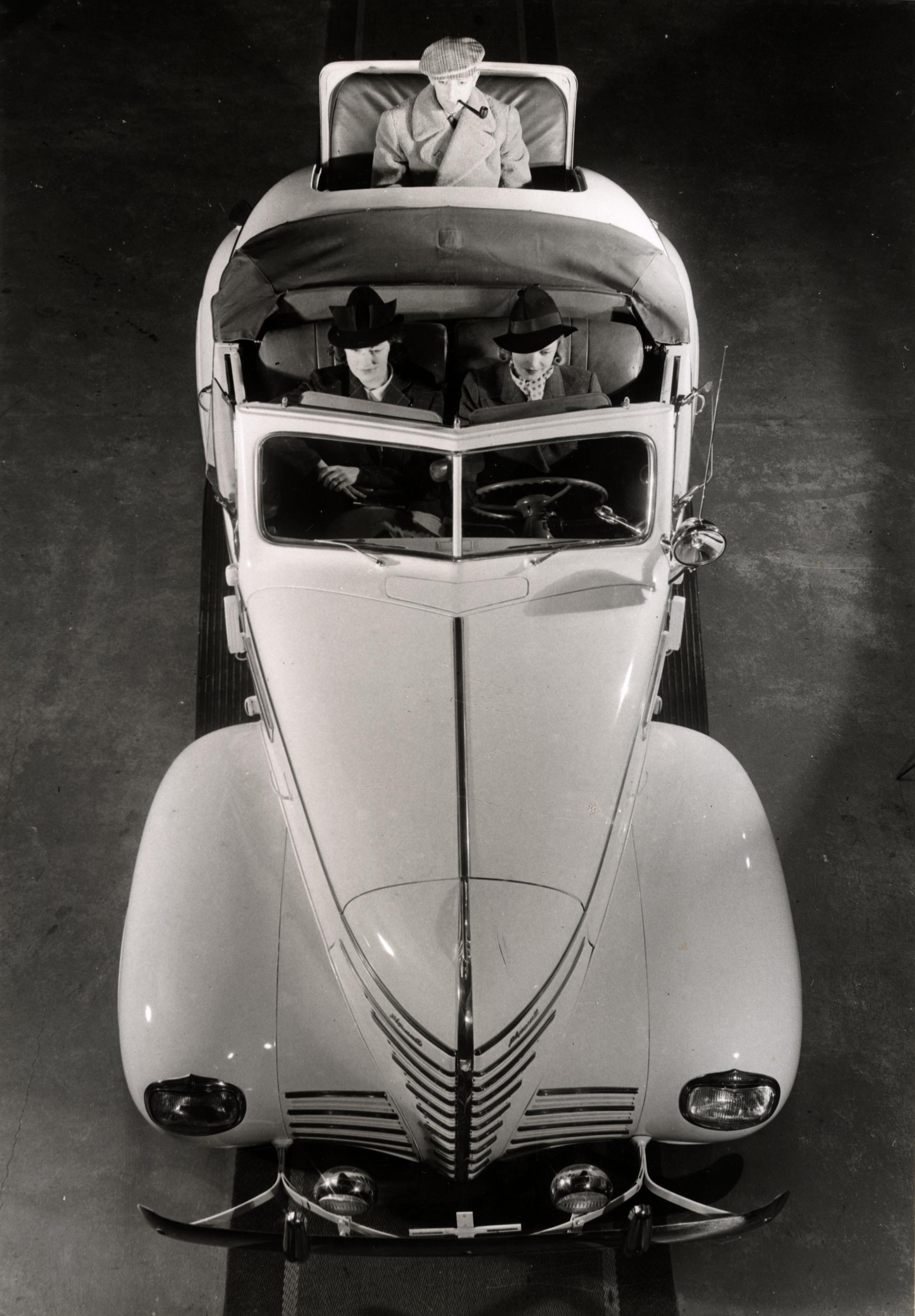 I en bil av märket Plymouth, öppen med suflett, sitter två kvinnor i framsätet, båda bär hatt. En piprökande man sitter i extrasätet i bagageluckan. Nordiska Kompaniet, automobiler. Ämnesord: Fordon : Bilism, Kvinna, Man, Mode.